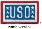 USO NC Logo